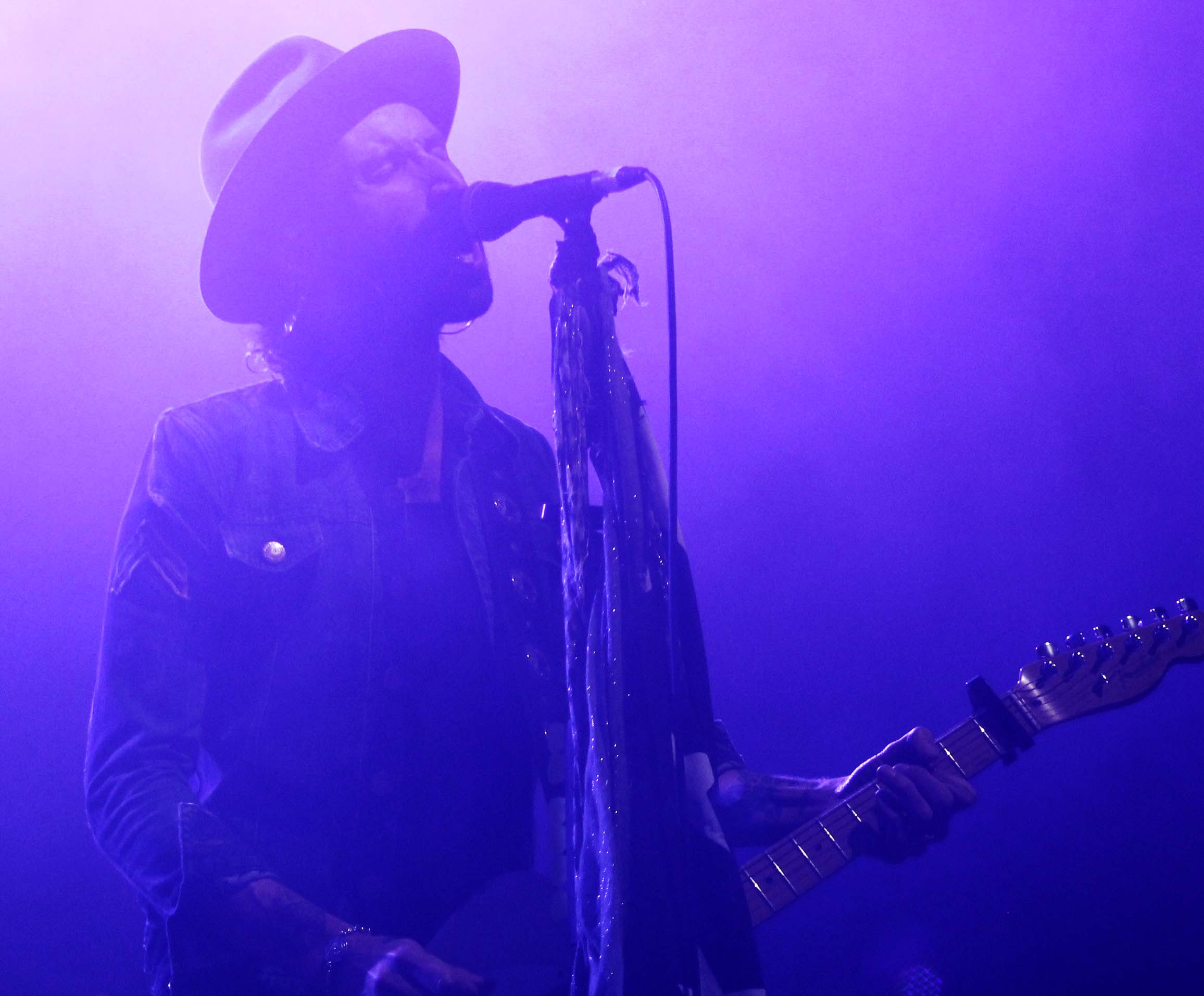 Leiva en su gira Pólvora a su paso por Valladolid